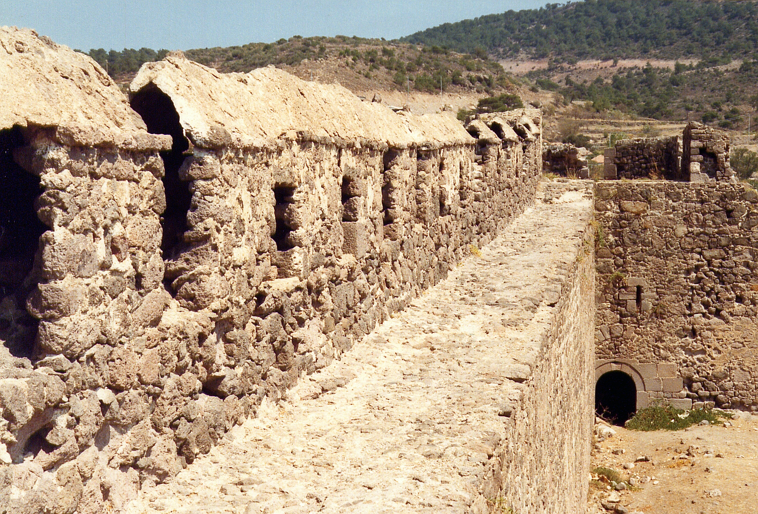 Babakale Festung, Westtürkei, westlichster Punkt Kleinasiens